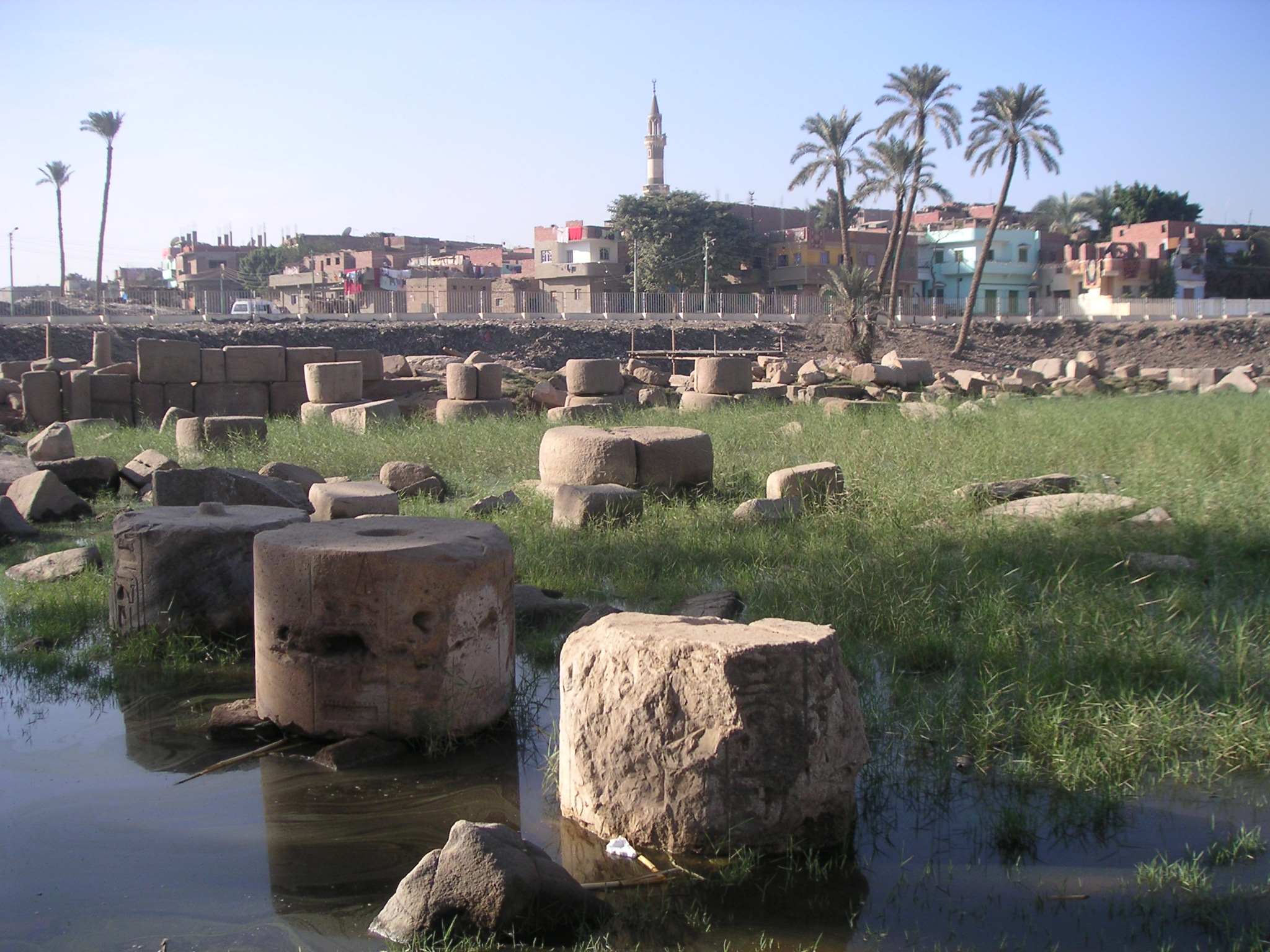 Ruines de la salle hypostyle et du pylône de Ramsès II - XIXe dynastie - Memphis - Mit Rahineh user:Neithsabes